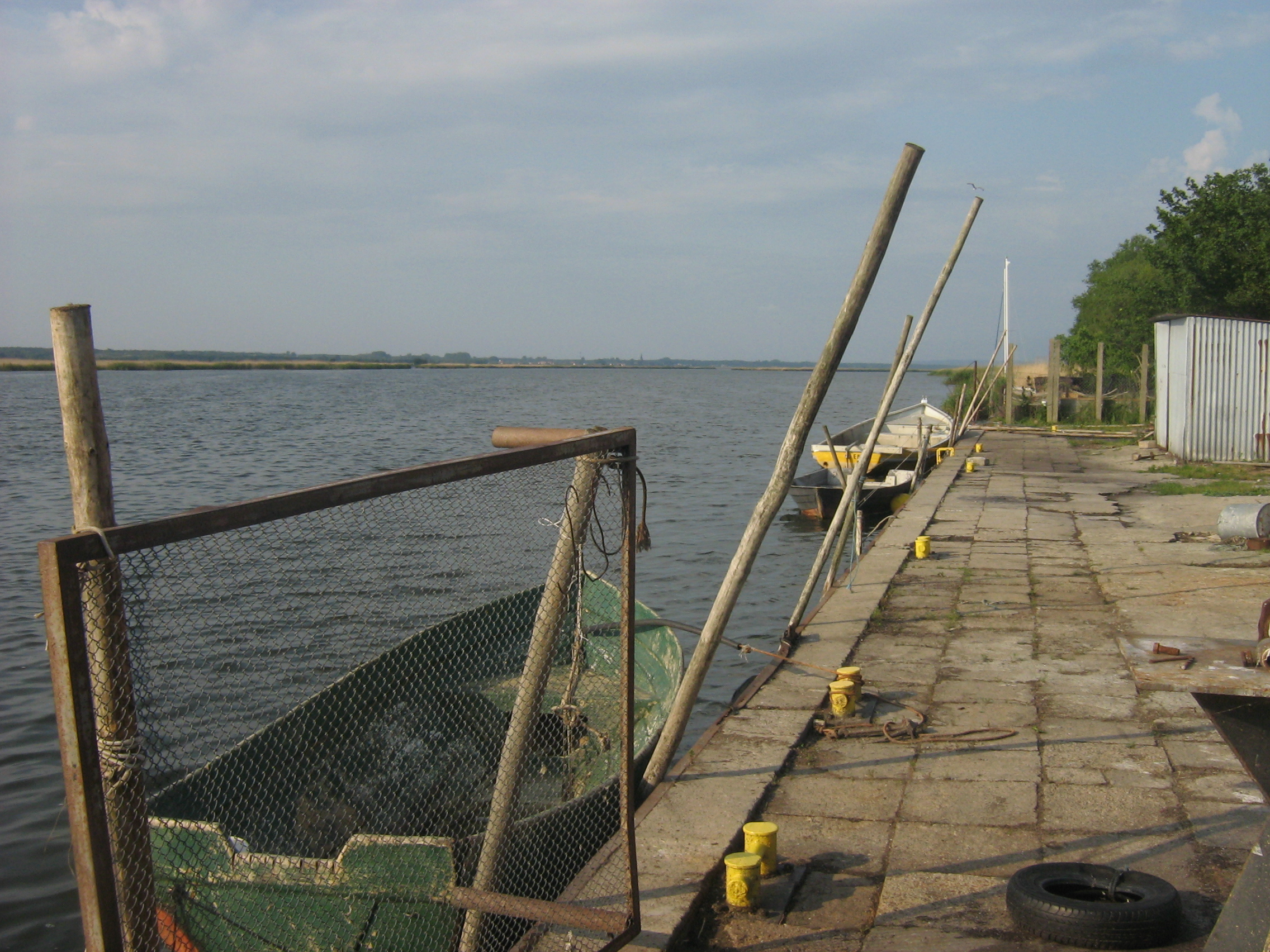 Port Karsibór